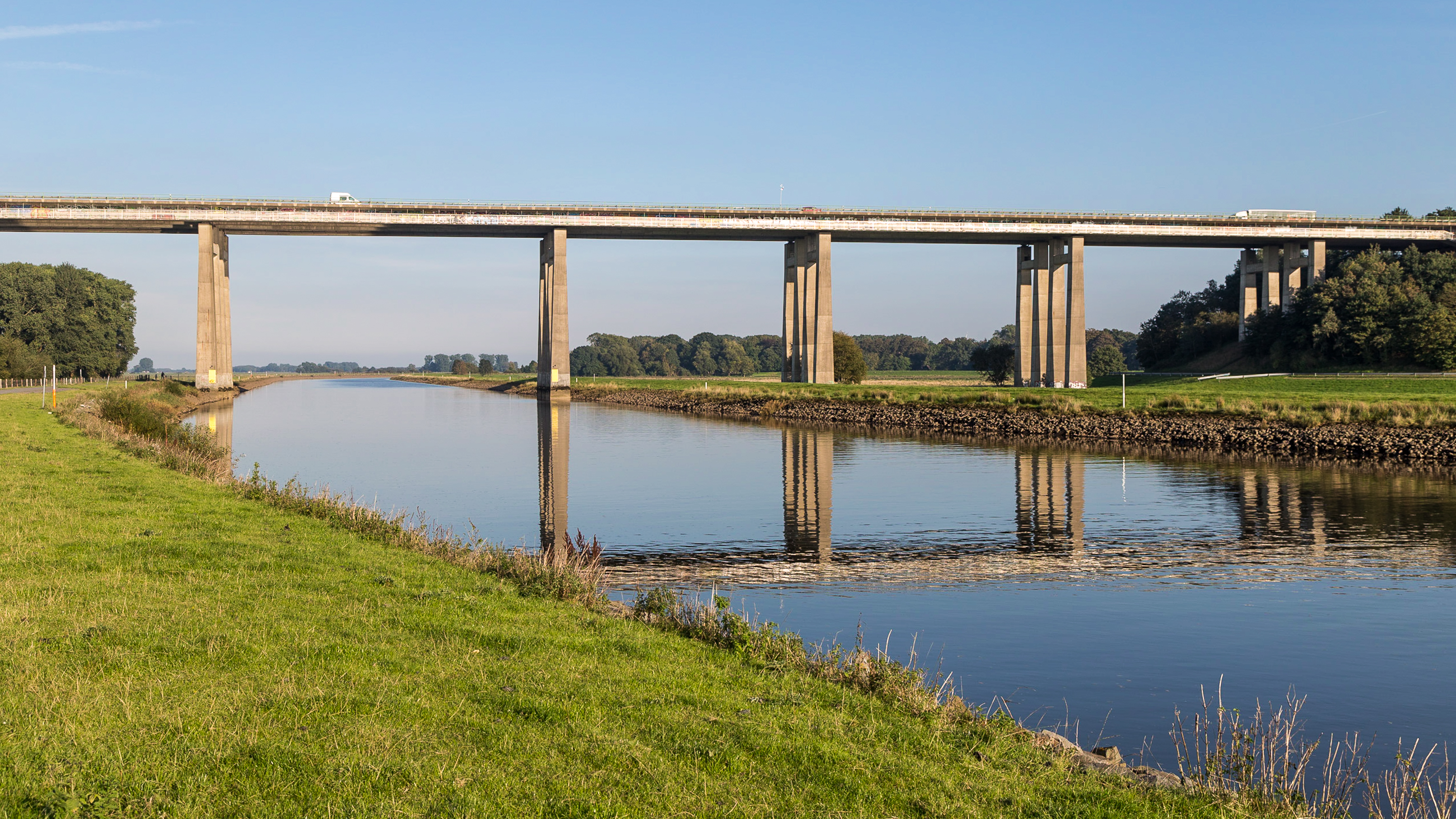 Brücke der A29 über die Hunte